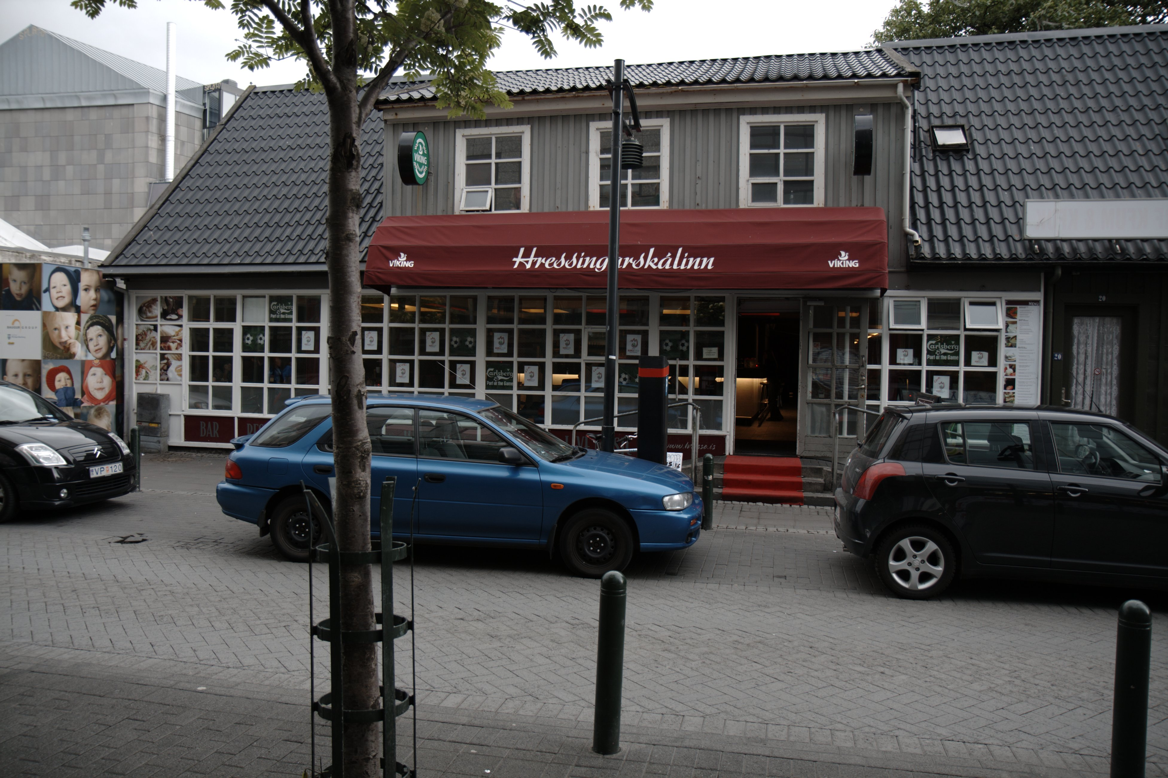 Hressingarskálinn